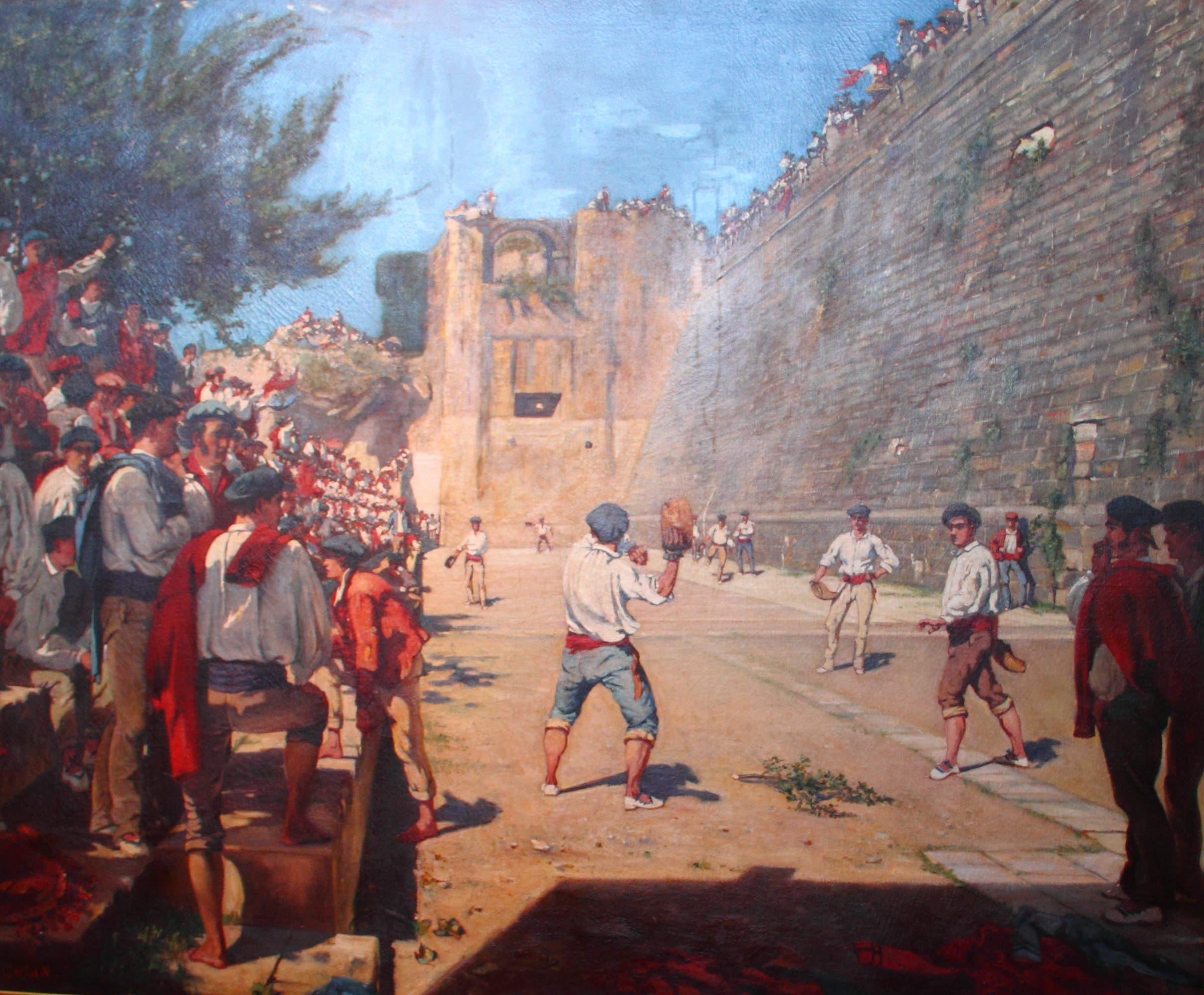 Peinture de Gustave Colin, 1863